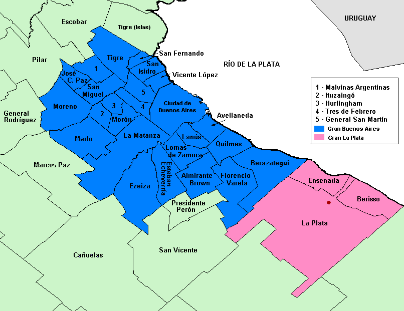 Gran Buenos Aires antes de 2006 (Ciudad de Buenos Aires + 24 partidos de la provincia de Buenos Aires). Fuente de datos: INDEC